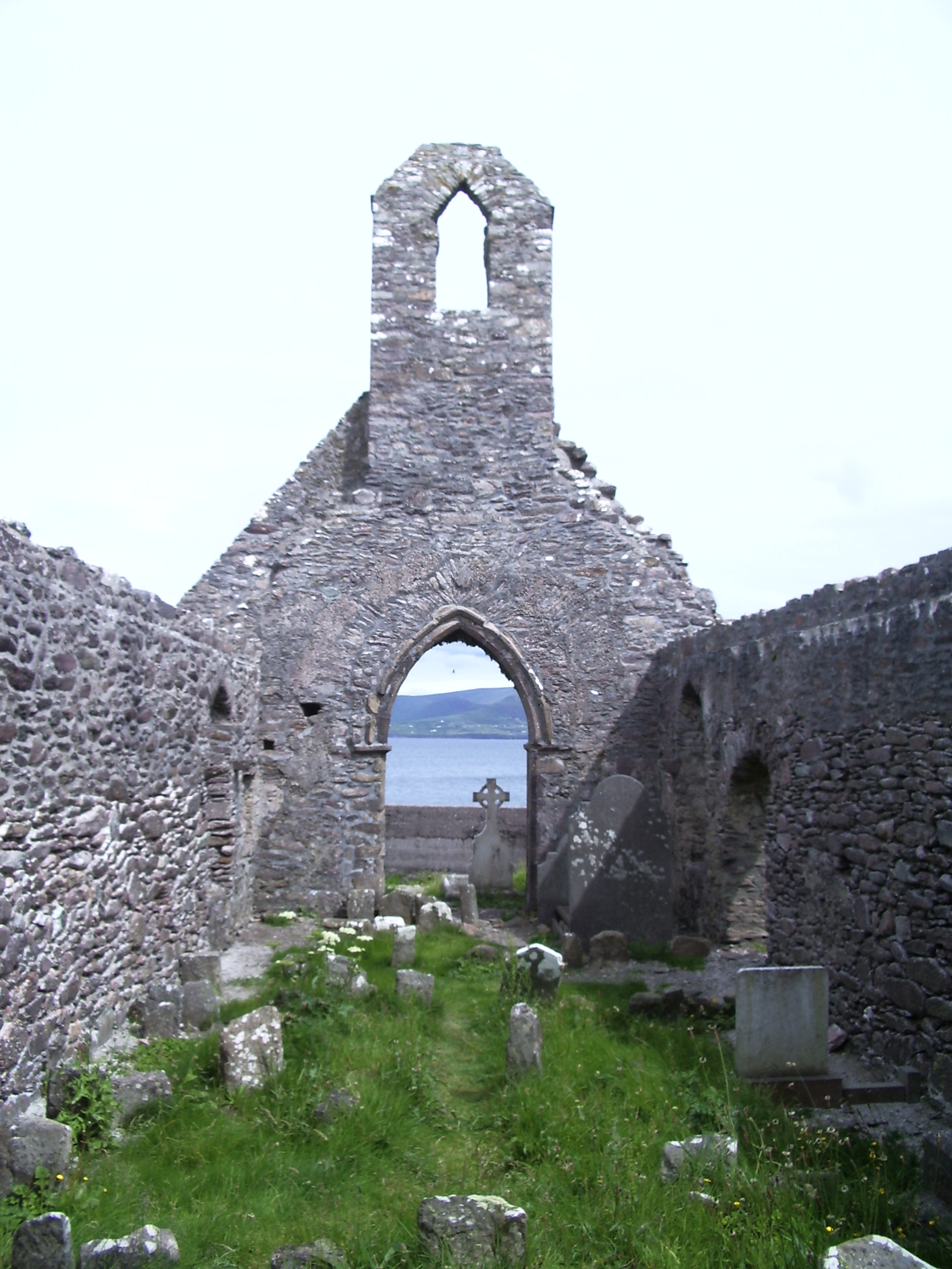 Augustinian Ballinskelligs Priory, Ruine der Klosterkirche